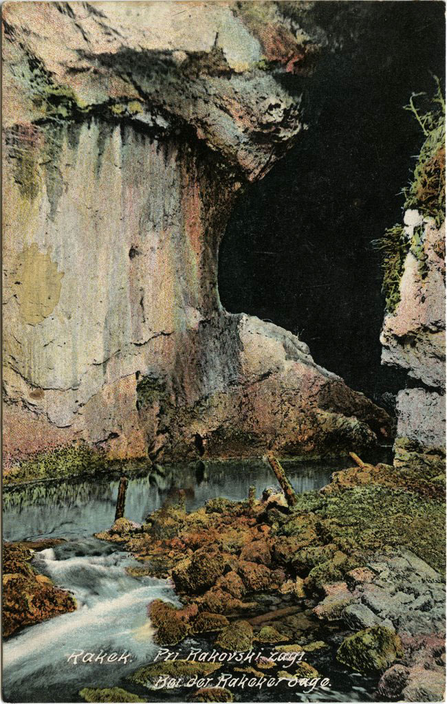 Rakov Škocjan – Zelške jame.